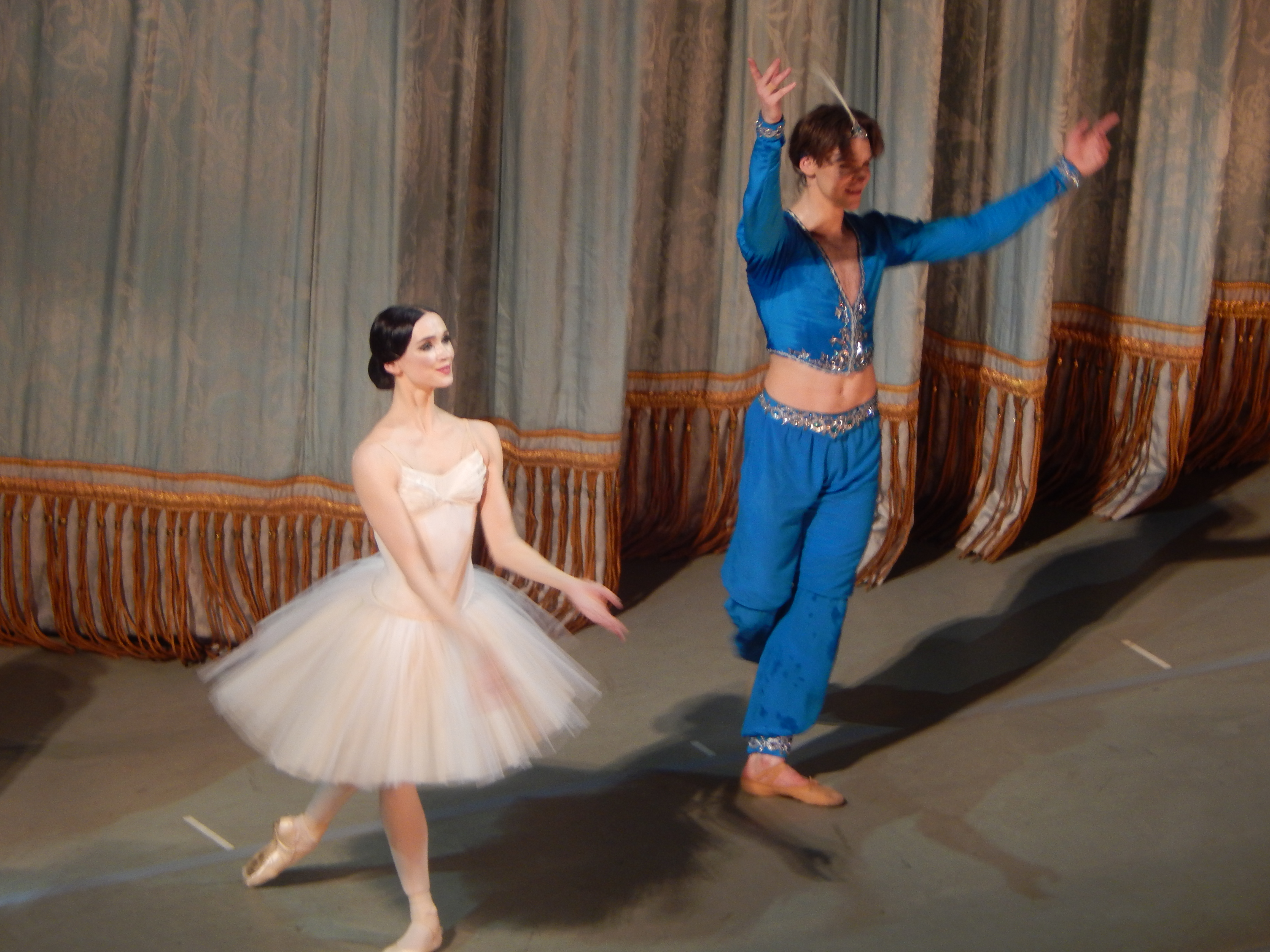 Мариинский театр, балет «Баядерка», 18 мая 2017 Олеся Новикова (слева) в роли Никии и Владимир Шкляров (справа) в роли Солора